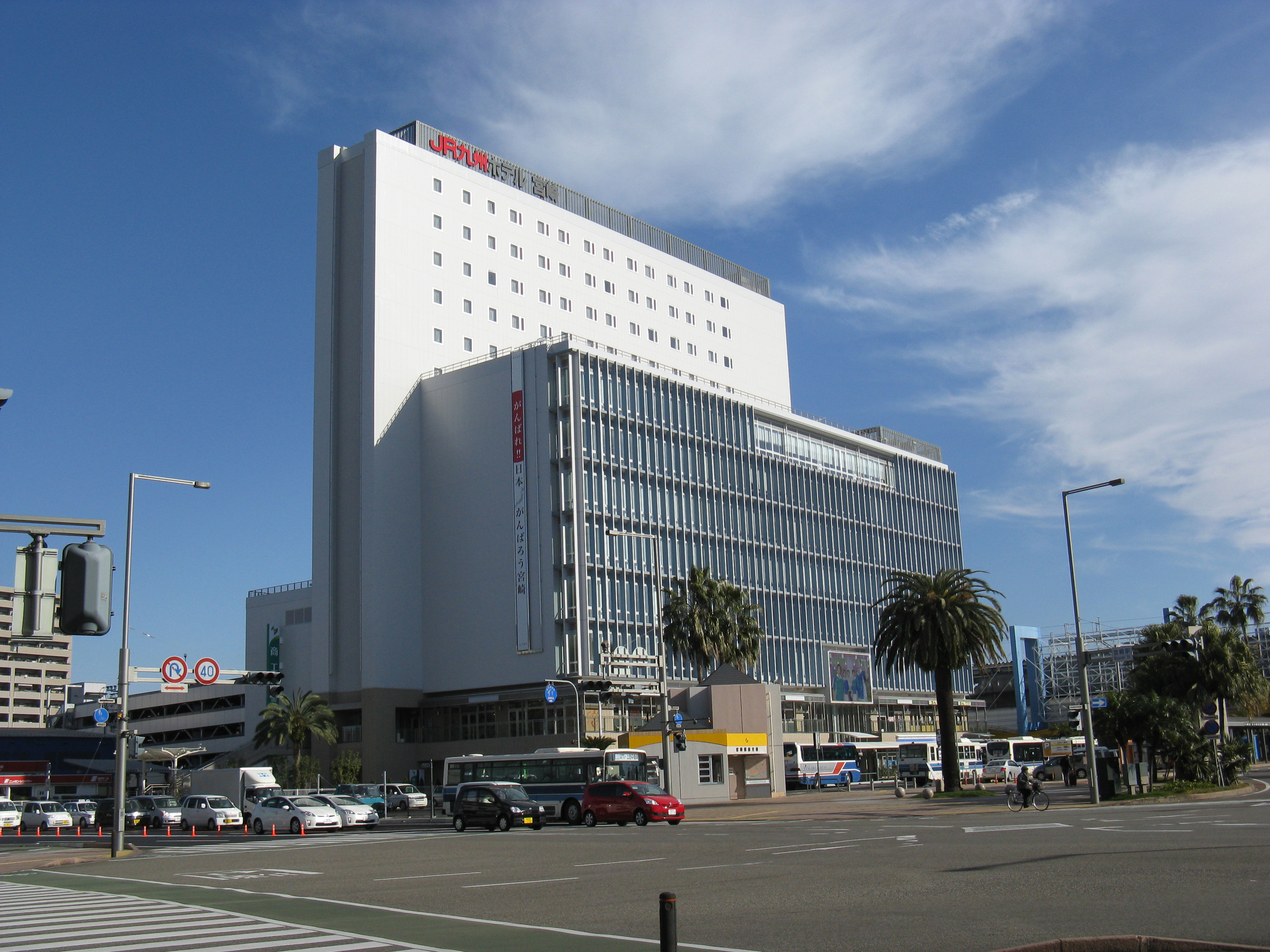 KITEN 2011年12月27日